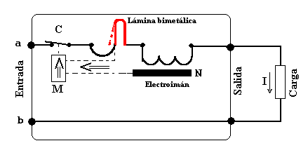 Diagrama simplificado de un magnetotérmico. Este diagrama ha sido creado por PACO 19:39 6 oct, 2004 (CEST).